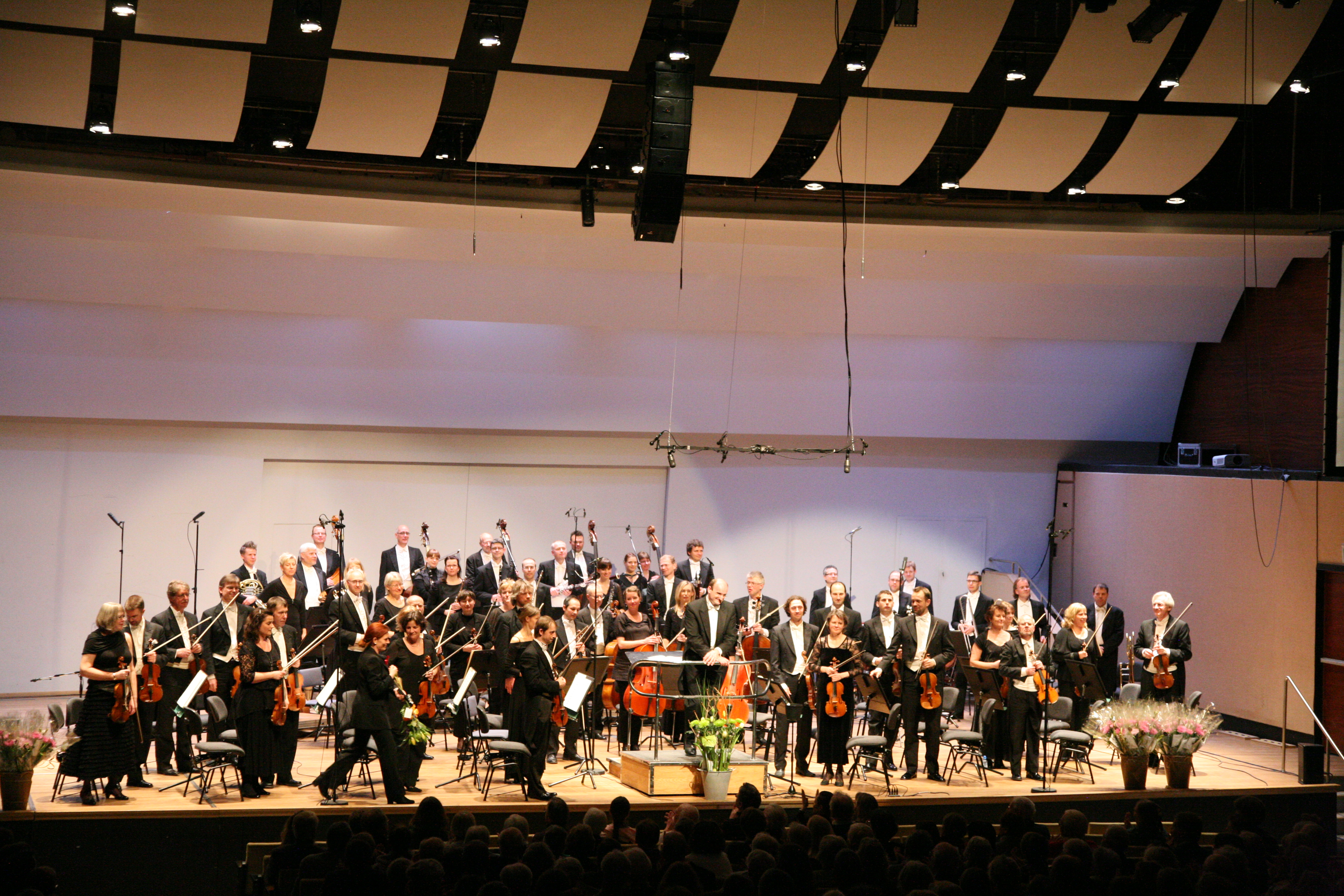 Helsingborgs konserhus. Jubileumskonsert 16/2 2012.